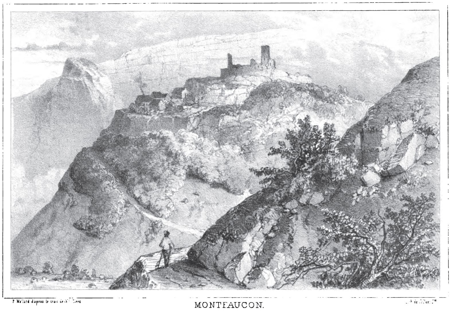 Gravure représentant les ruines du château de Montfaucon